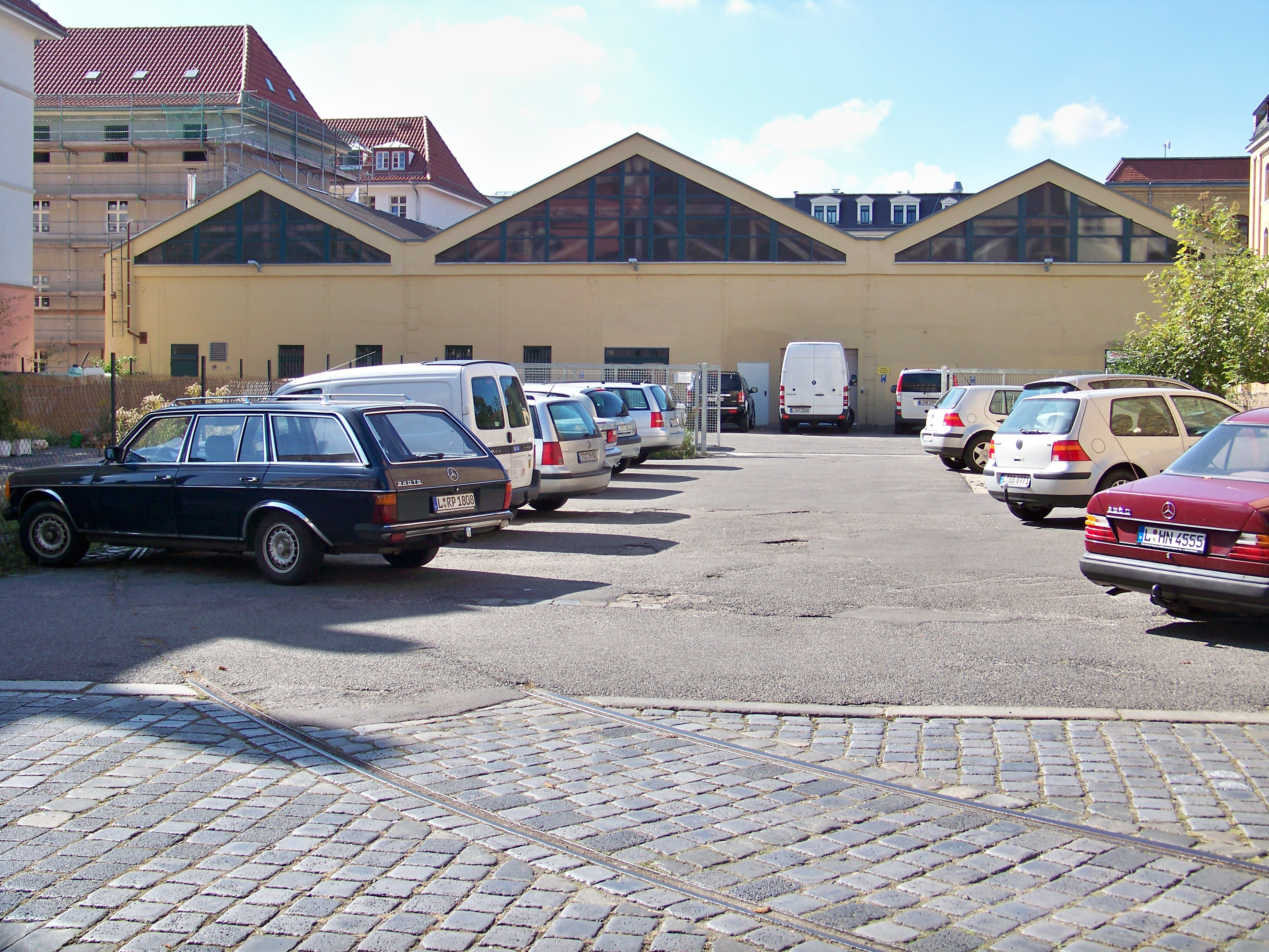 Ehemaliger Straßenbahnhof Connewitz II in der Zwenkauer Straße in Leipzig